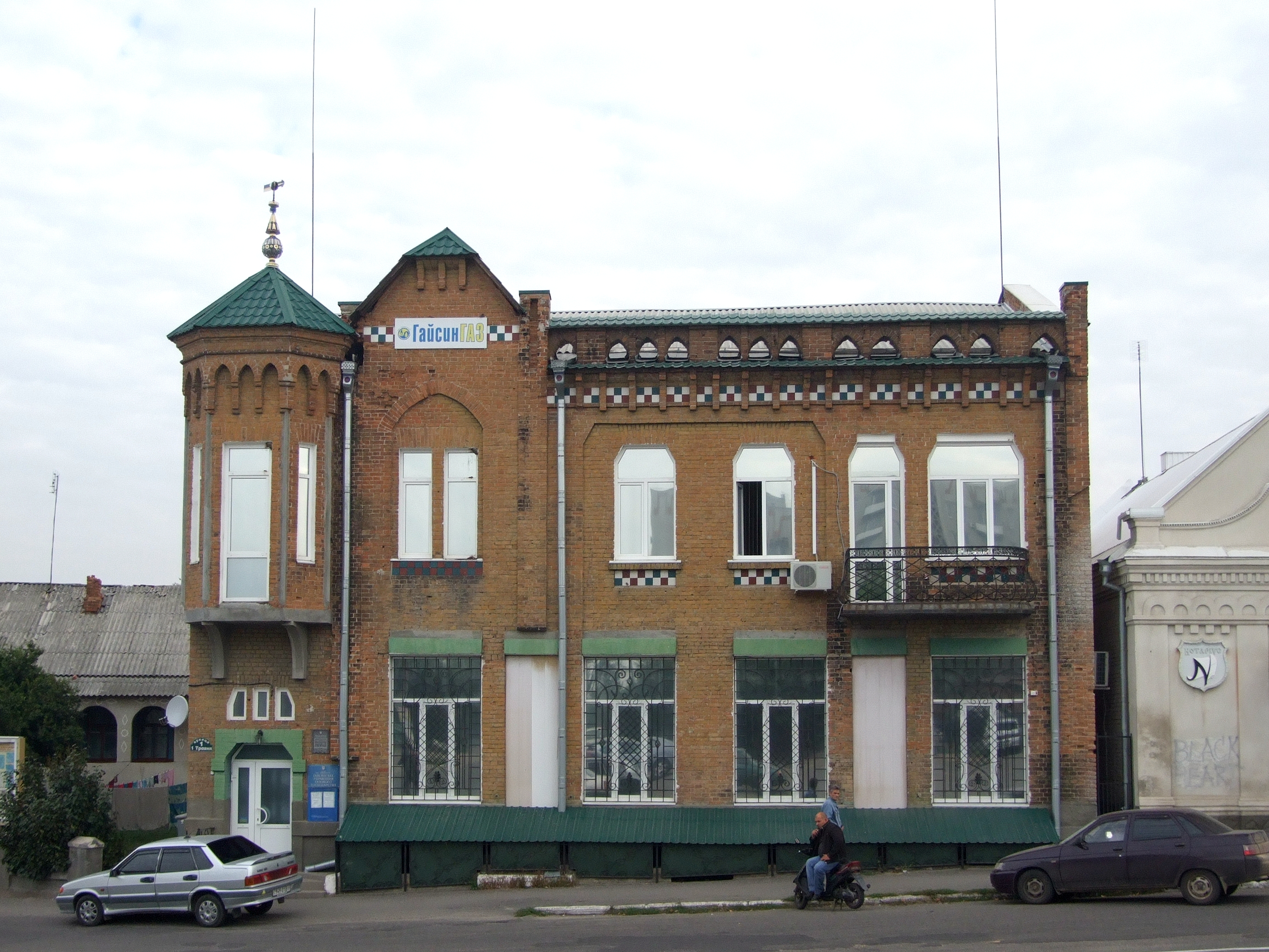 Колишній готель “Гранд-отель”, 1905 р.